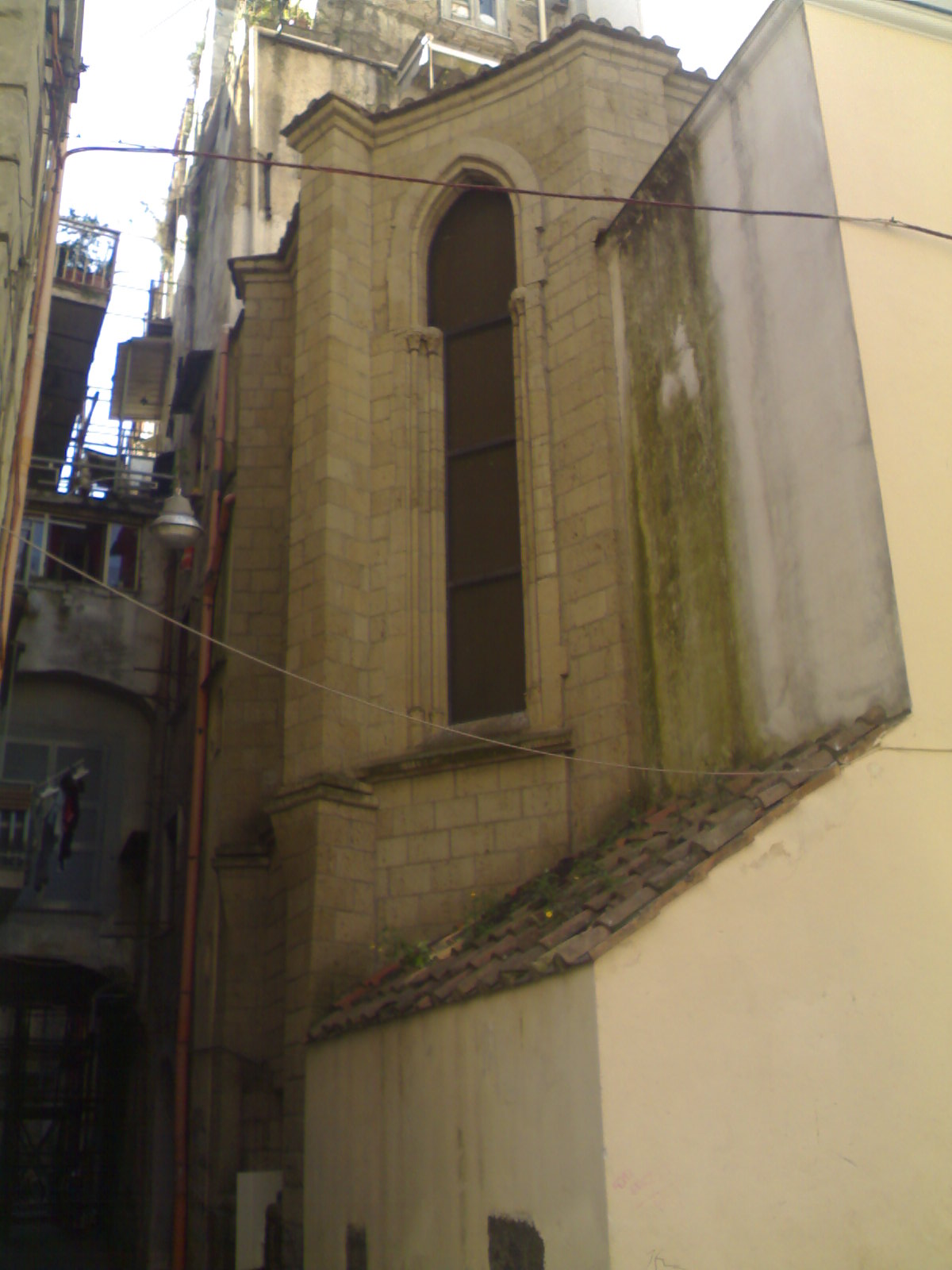 Chiesa di Sant'Agrippino a Forcella, abside gotico (Napoli)